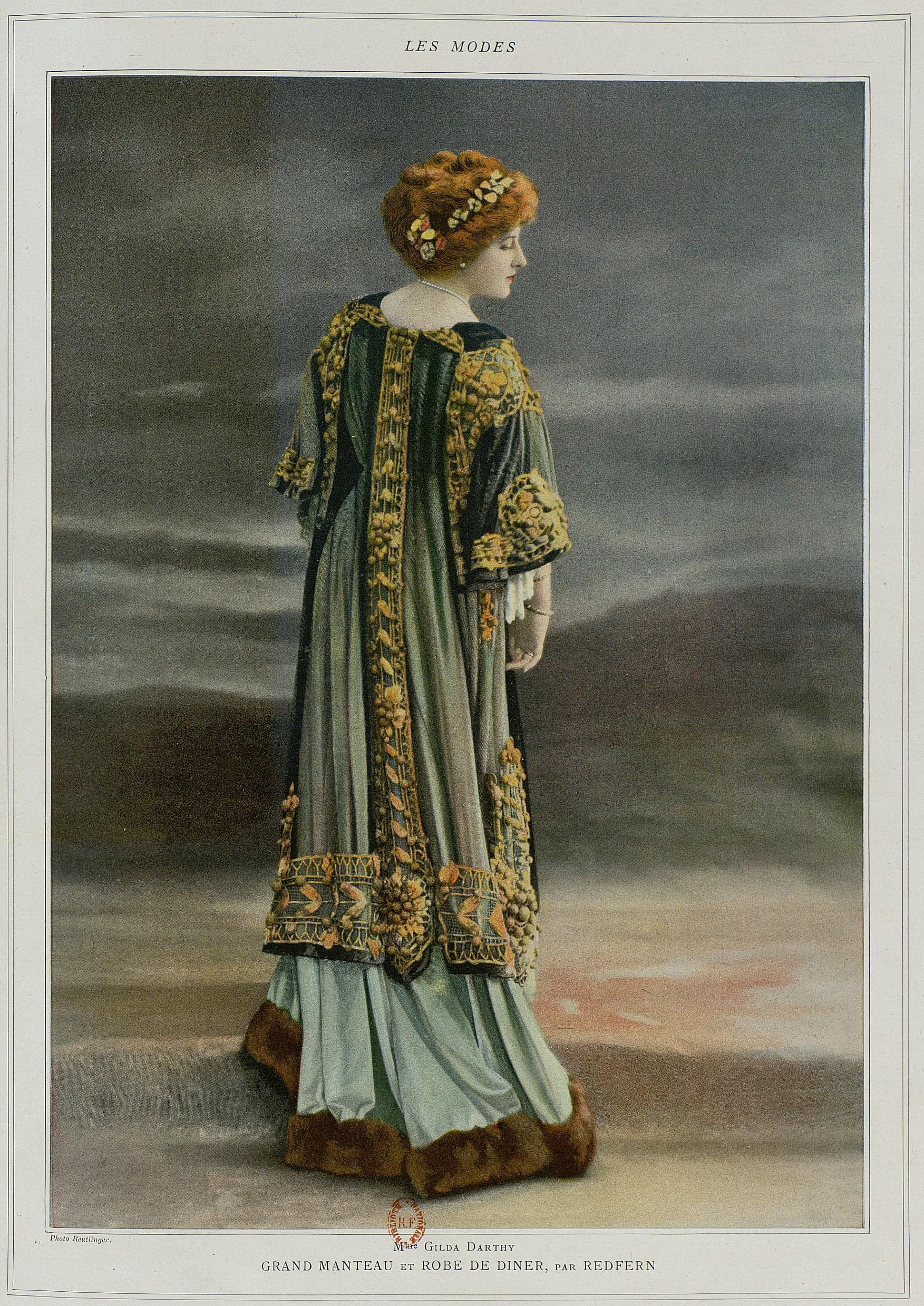 Mlle Gilda Darthy. "Robe princesse en velours bleu Nattier bordée d'une bande de zibeline.Grand manteau en tulle brodé d'or et d'argent, lignes soulignées de biais en satin bleu Natier". Photograph in Les Modes : Revue mensuelle illustrée des arts décoratifs appliqués à la femme.